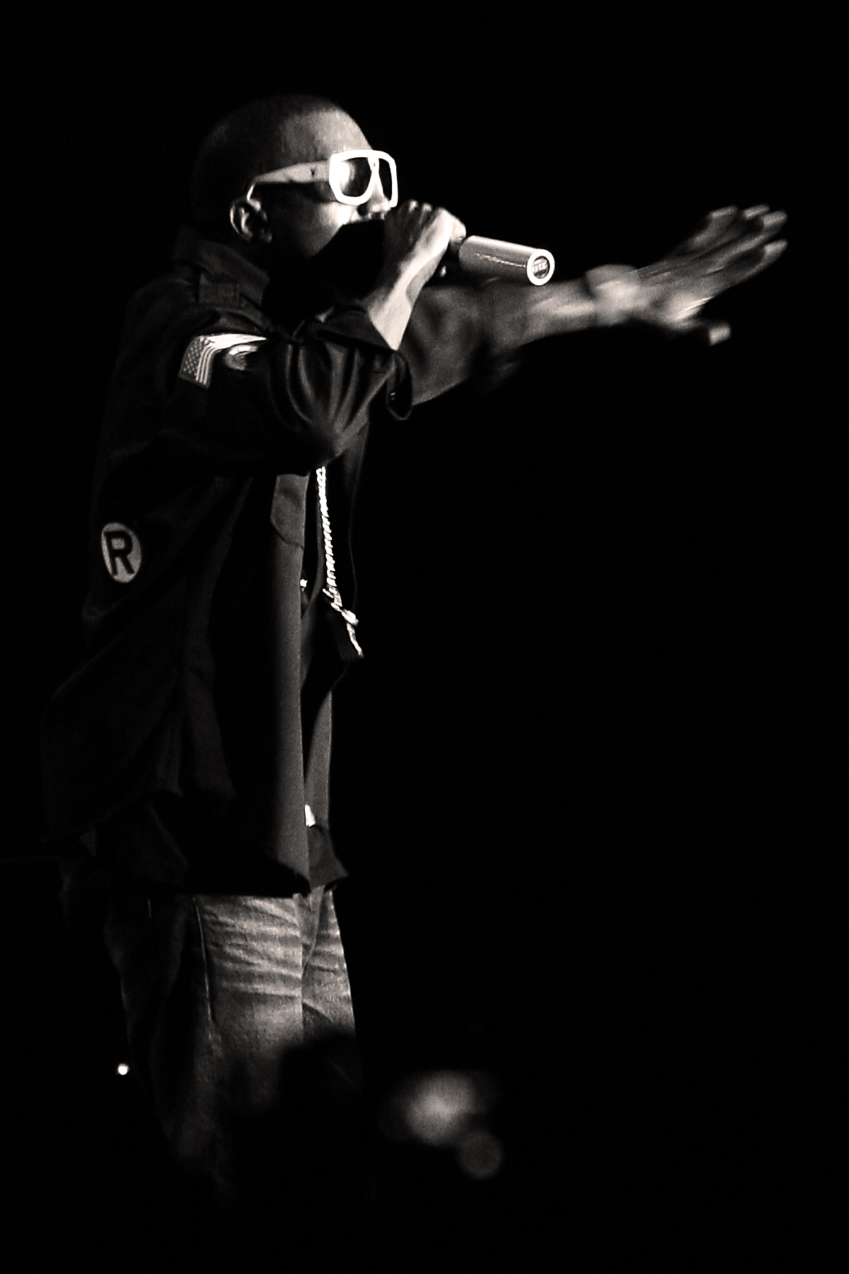 Kanye West